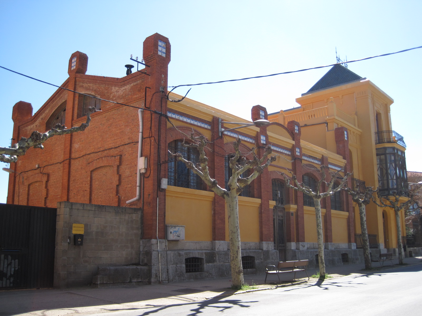 Casa de Don Paulino, en Astorga (provincia de León, España).